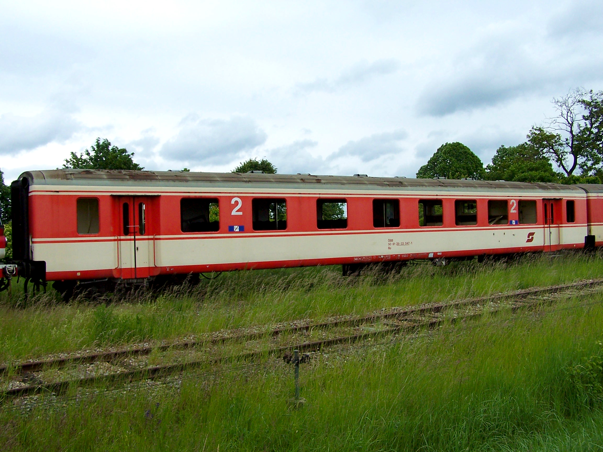 Bp 28-33 047-1 (ex ABp 37-35) am Bahnhof Pulkau